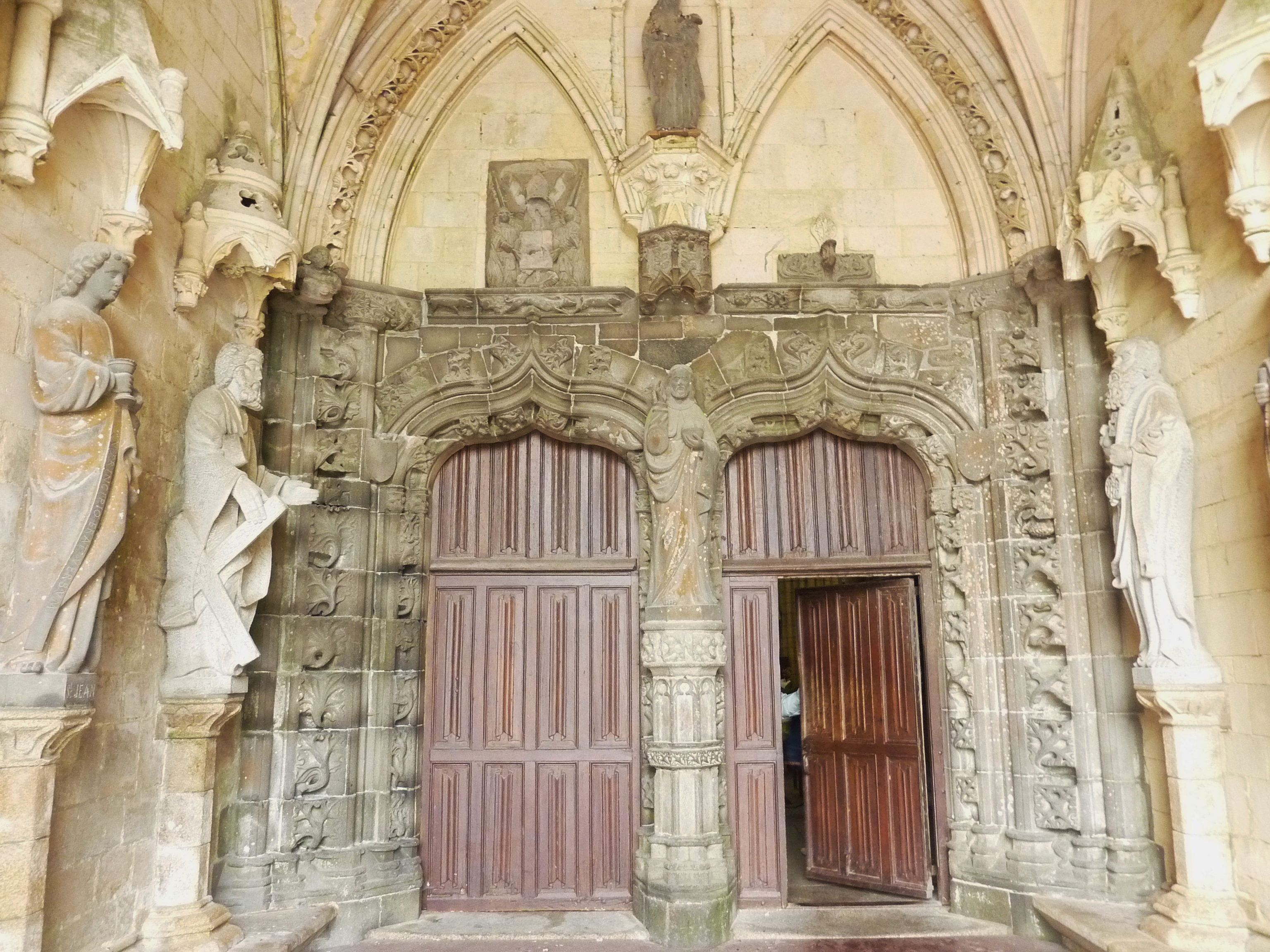 Saint-Pol-de-Léon : cathédrale Saint-Paul-Aurélien, porche sud, portes jumelées